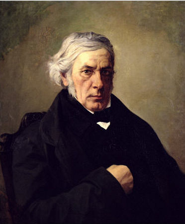 Французский философ-спиритуалист Виктор Кузен (1792-1867)